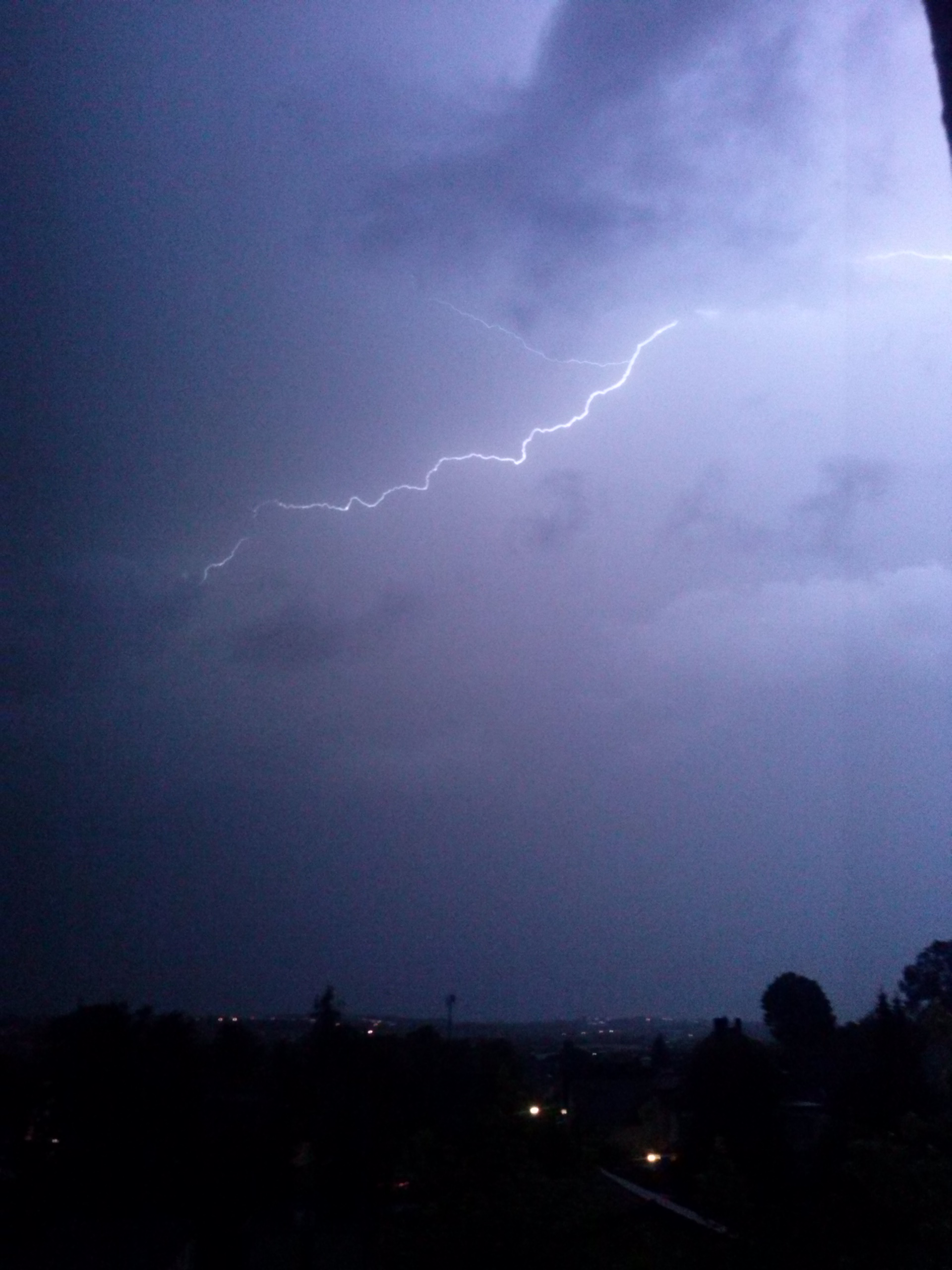 das Unwetter über Dortmund